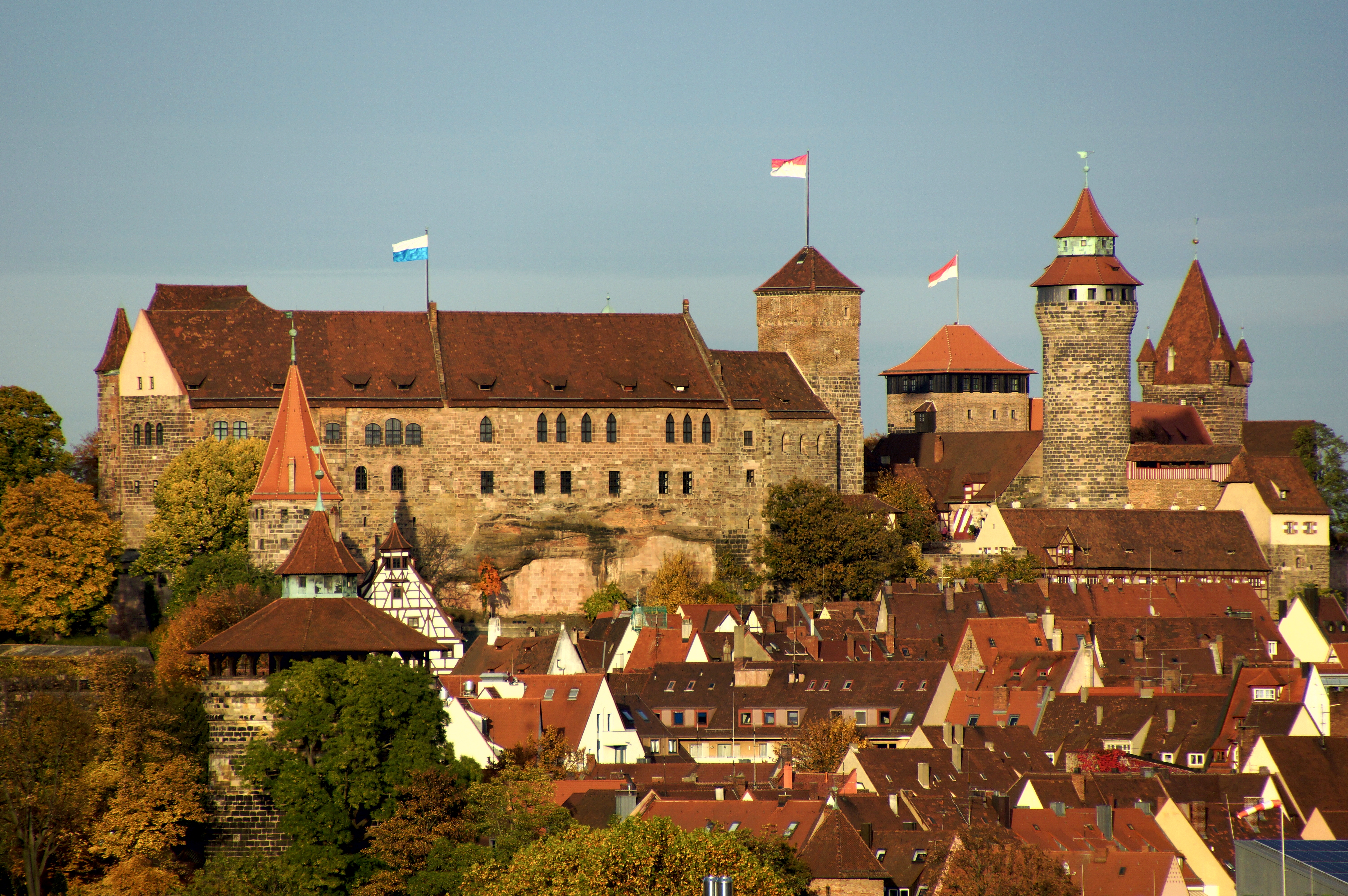 Nürnberger Burg im Herbst 2013 von Südwesten